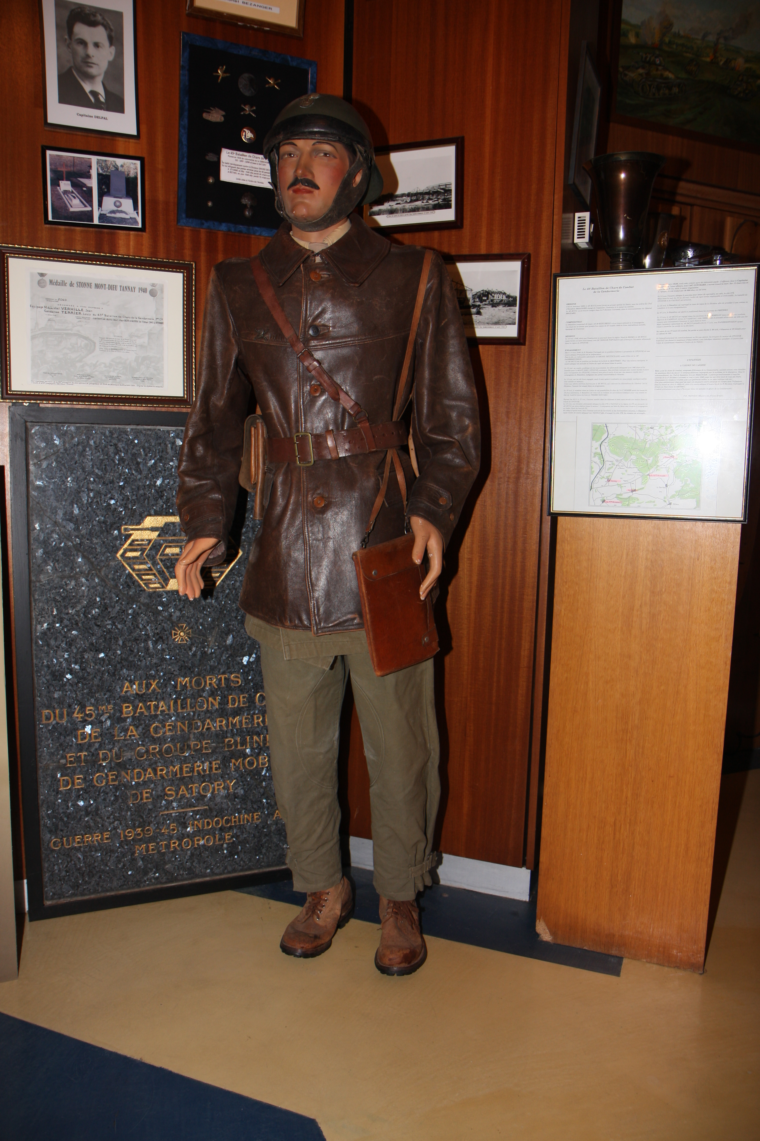 Tankiste du 45e BCC - Salle de traditions du GBGM - Satory (78)